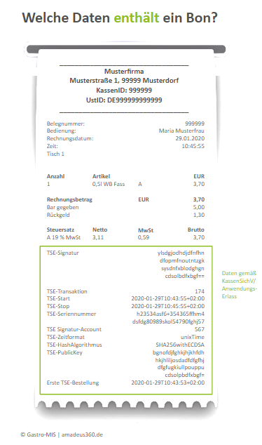 Dieses Bild verdeutlicht, welche Daten laut Kassensicherungsverordnung seit 01.01.2020 auf dem Kassenbon zu stehen haben.